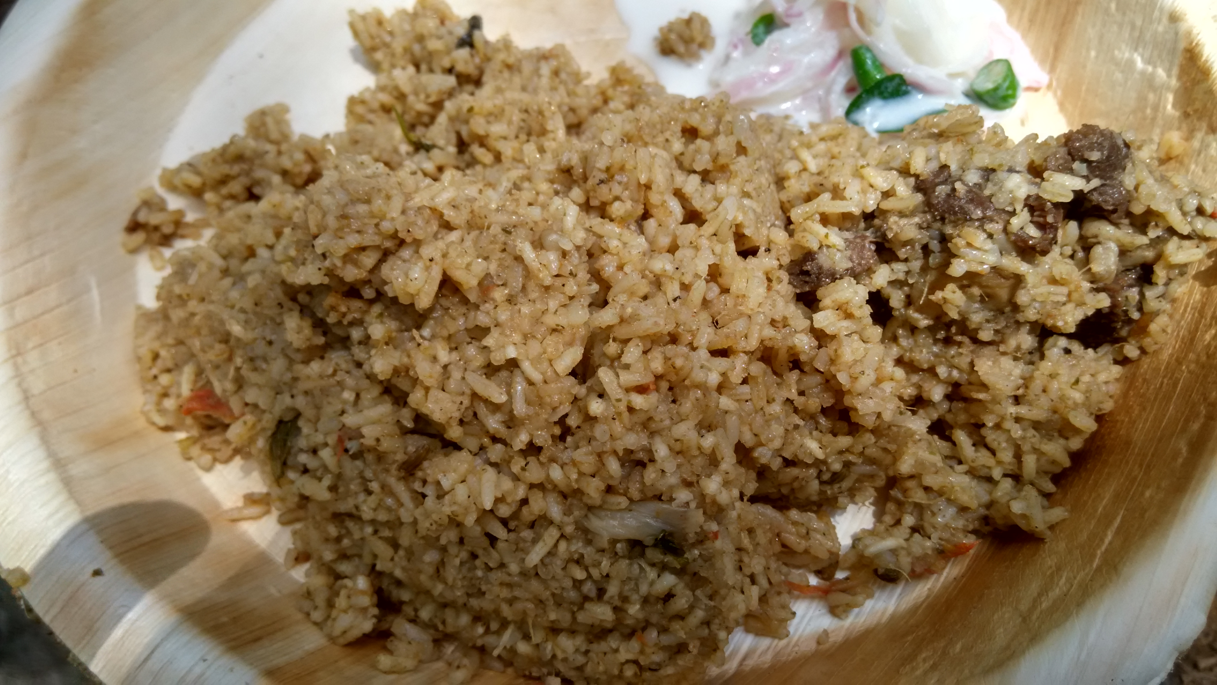 ஆட்டுக்கறி புலவுச்சோறு(Mutton or lamp Biryani)